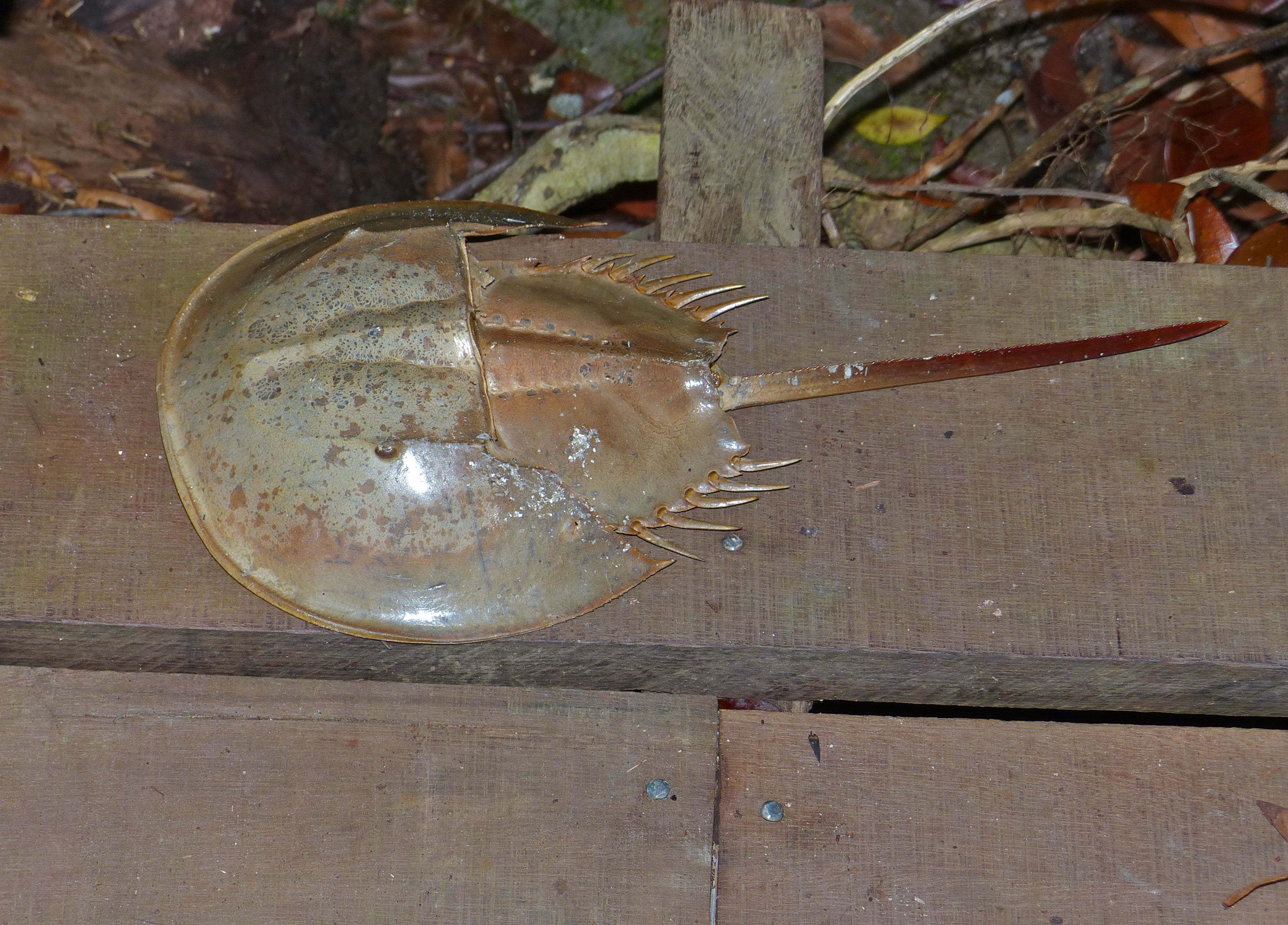 Lintang Trail, Bako NP, Sarawak, MALAYSIA